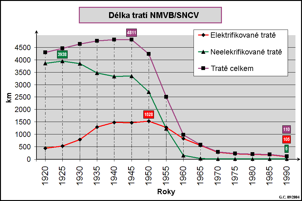 Graf ukazující délku belgických tratí provozovaných společností NMVB/SNCV v průběhu 20. století